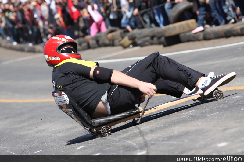 Carrinho de rolimã em competição de downhill